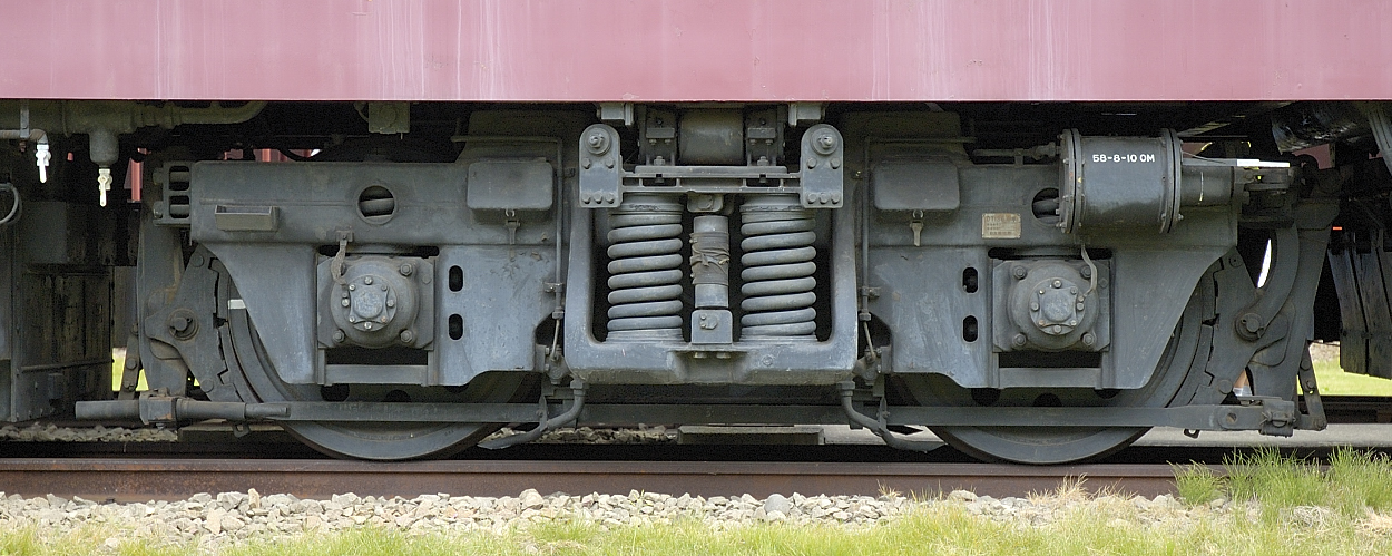 日本国有鉄道（国鉄）所属 EF80形電気機関車 (EF80 63) のDT136形台車